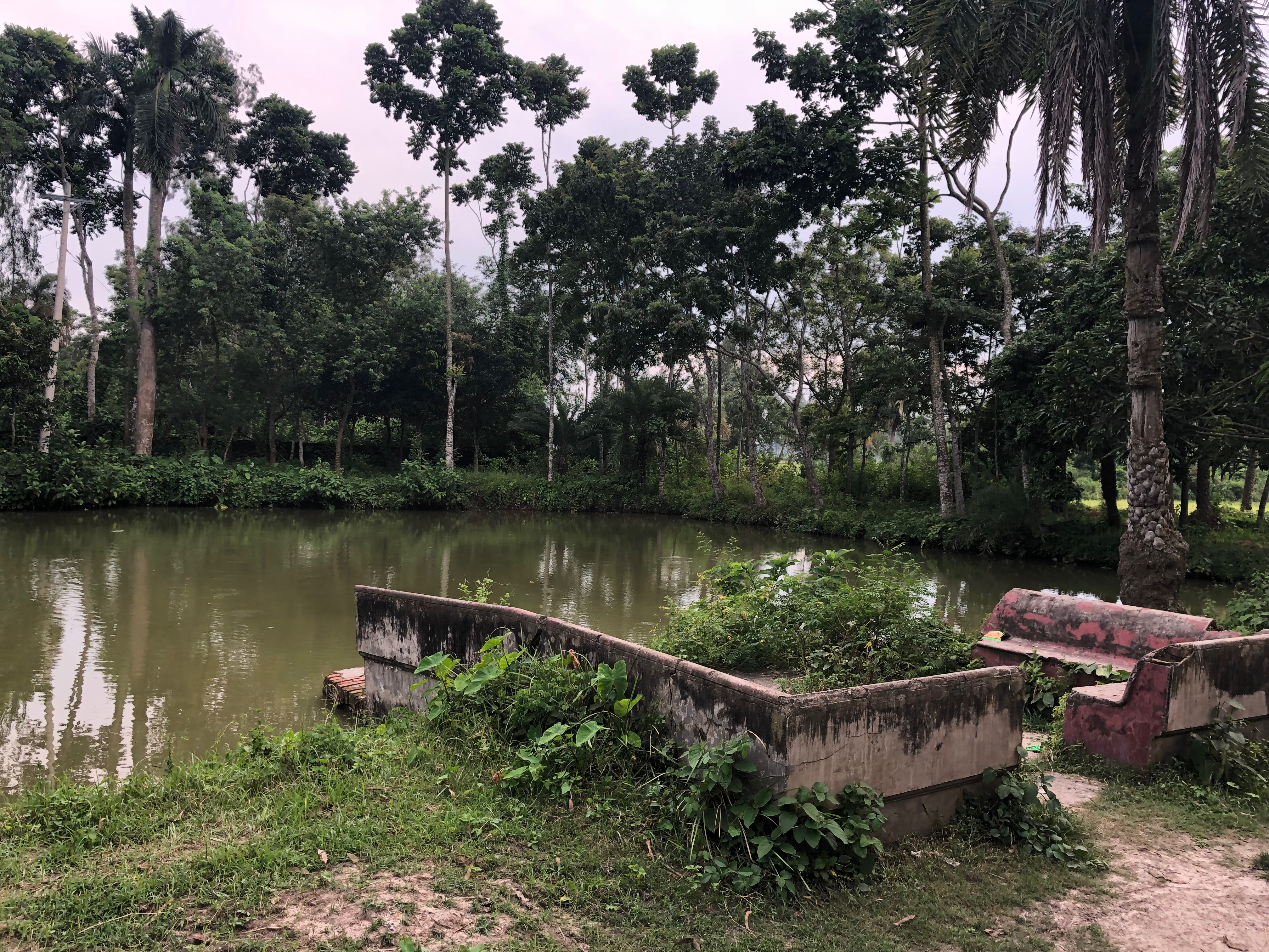 গুনাহার জমিদার বাড়ির পুকুরের দৃশ্য